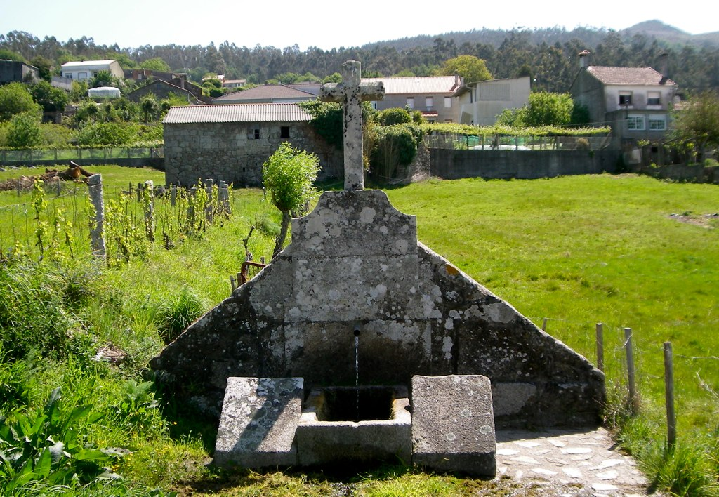 Fonte da Picalla en Laxos